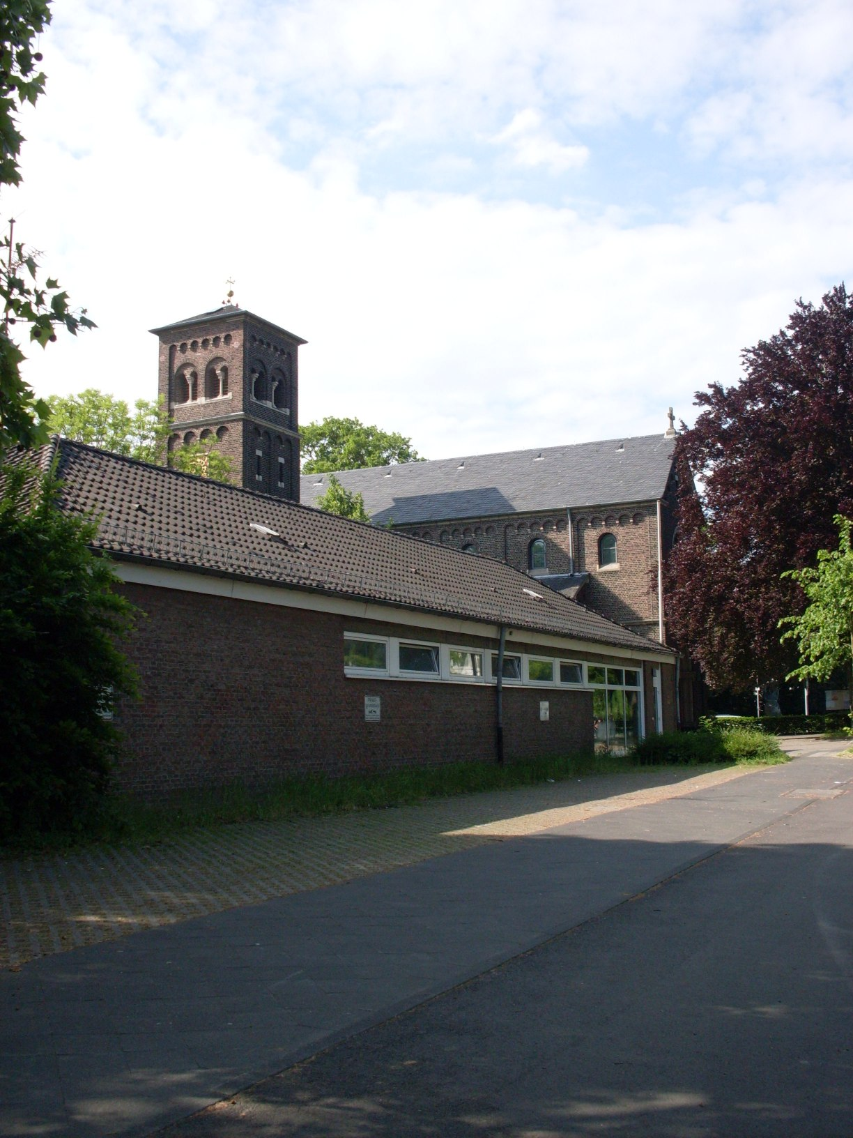 Katholisches Gemeindezentrum in Düsseldorf-Lohausen mit der Kirche St. Mariä Himmelfahrt im Hintergrund